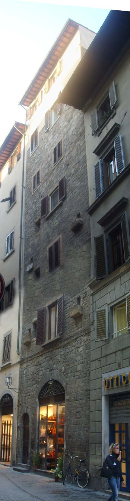 Torre_dei_Della_Bella in florence italy